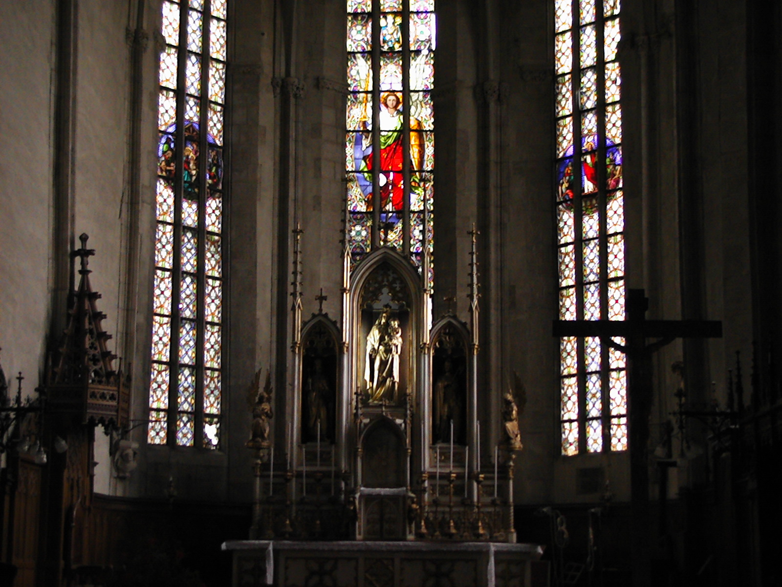 Szent Mihály-templom oltára (Kolozsvár)